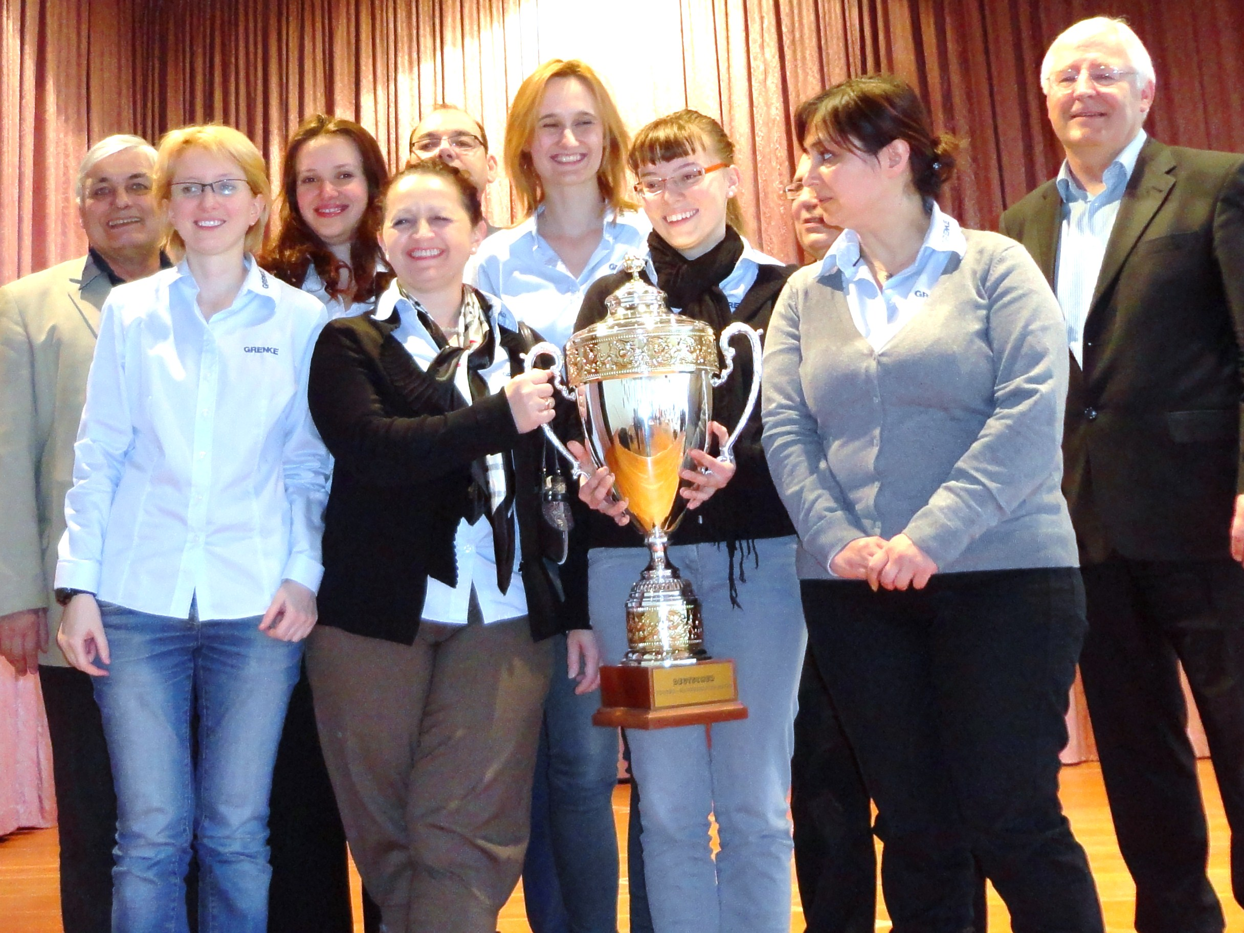 Die Mannschaft der OSG Baden-Baden (1. Platz), Deutsche Schachbundesliga der Frauen Saison 2011/12, Finalrunden in Gladenbach. Links neben den Damen ist Joachim Gries (Vizepräsident des Deutschen Schachbundes) und rechts Klaus-Dieter Knierim (Bürgermeister von Gladenbach) zu sehen.